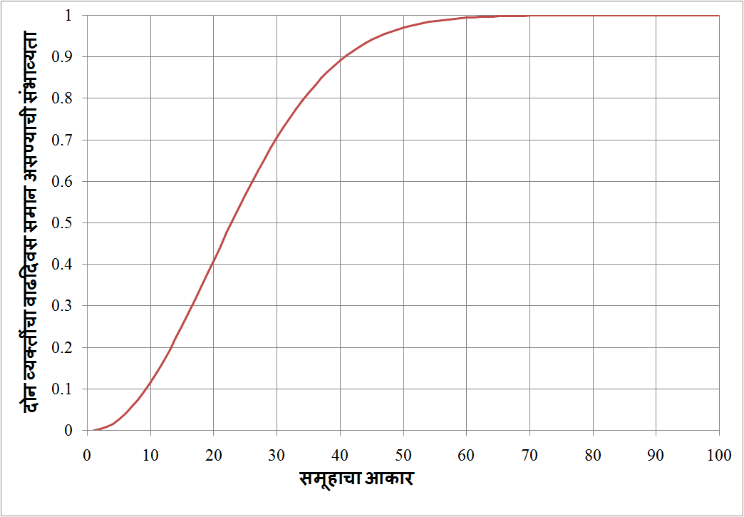 वाढदिवस समस्येमधील समूह आकार व संभाव्यता यांचा आलेख.